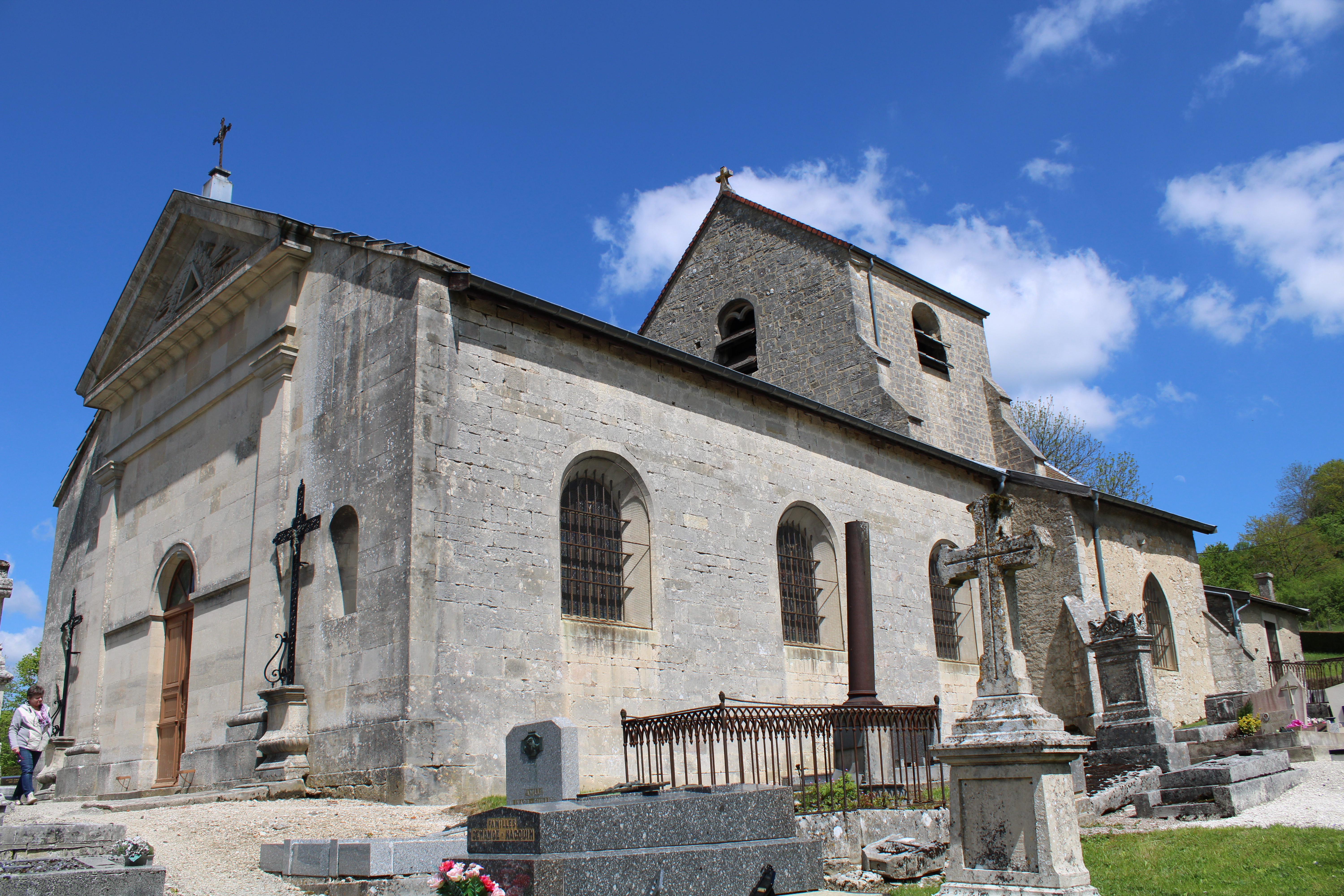 L'église.